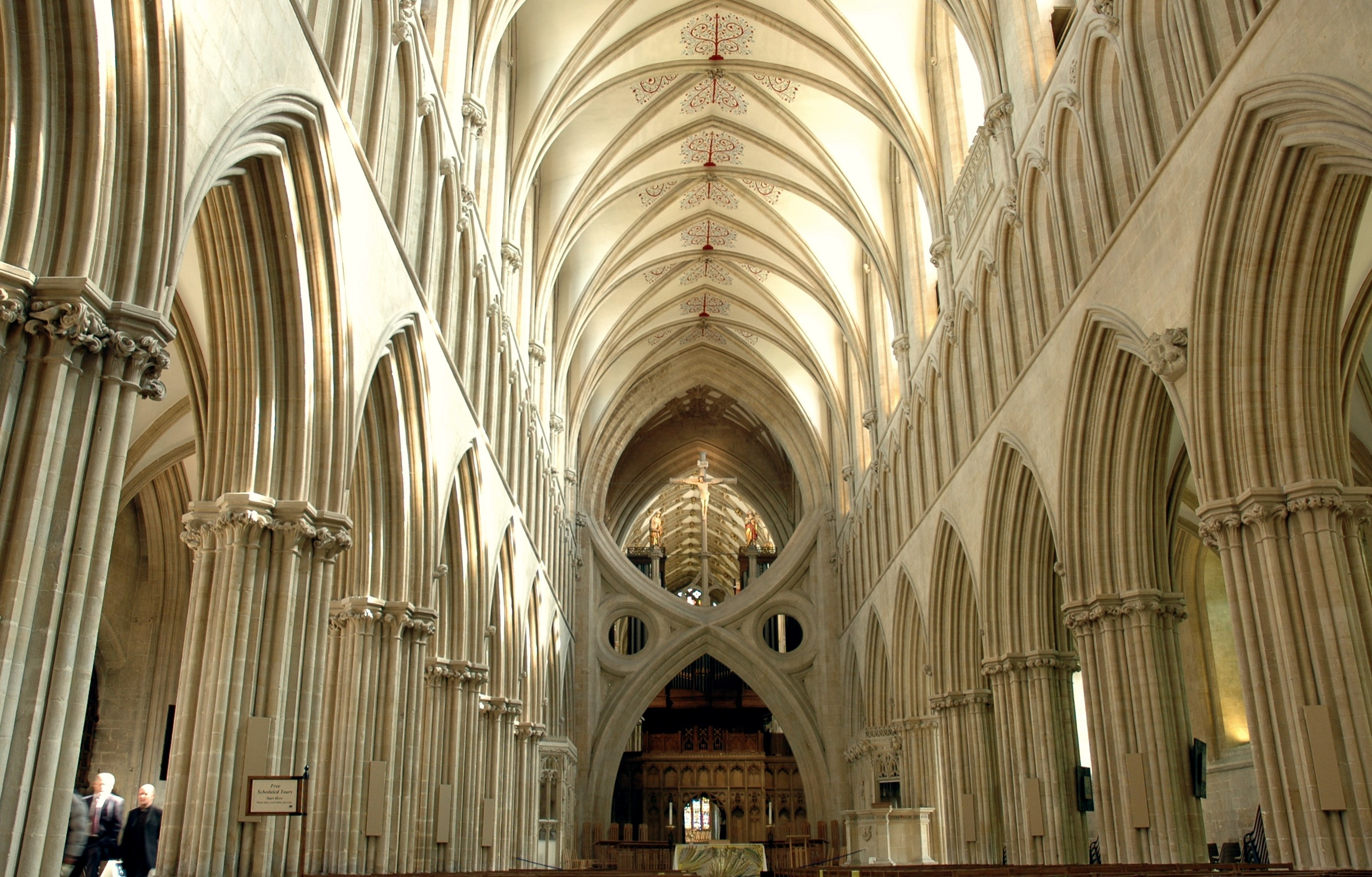 Cateral de Wells - Arc tisora